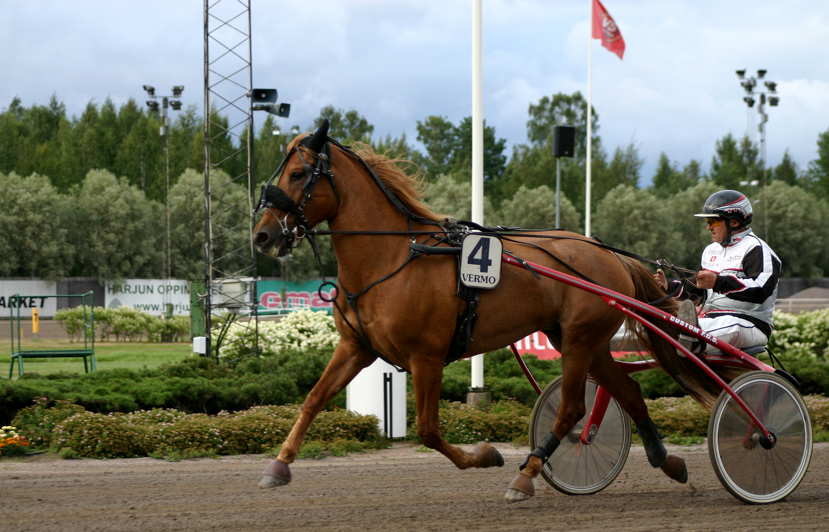 Ravikuningatar title winner B. Helmiina, 12 yo with Reijo Borgström.